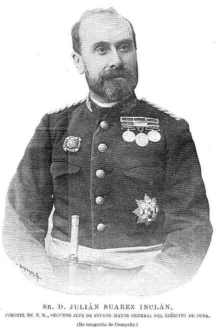 Retrato de Julián Suárez Inclán, a partir de una fotografía de Manuel Compañy, recogido en la revista española La Ilustración Española y Americana.